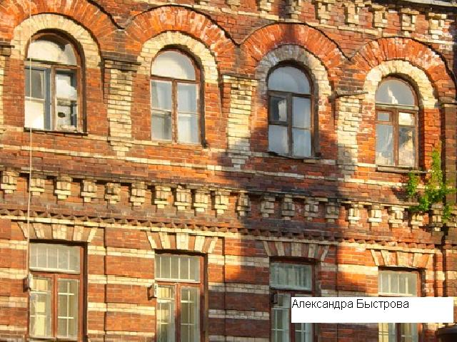 Крапивенский переулок. Здание Константинопольского подворья